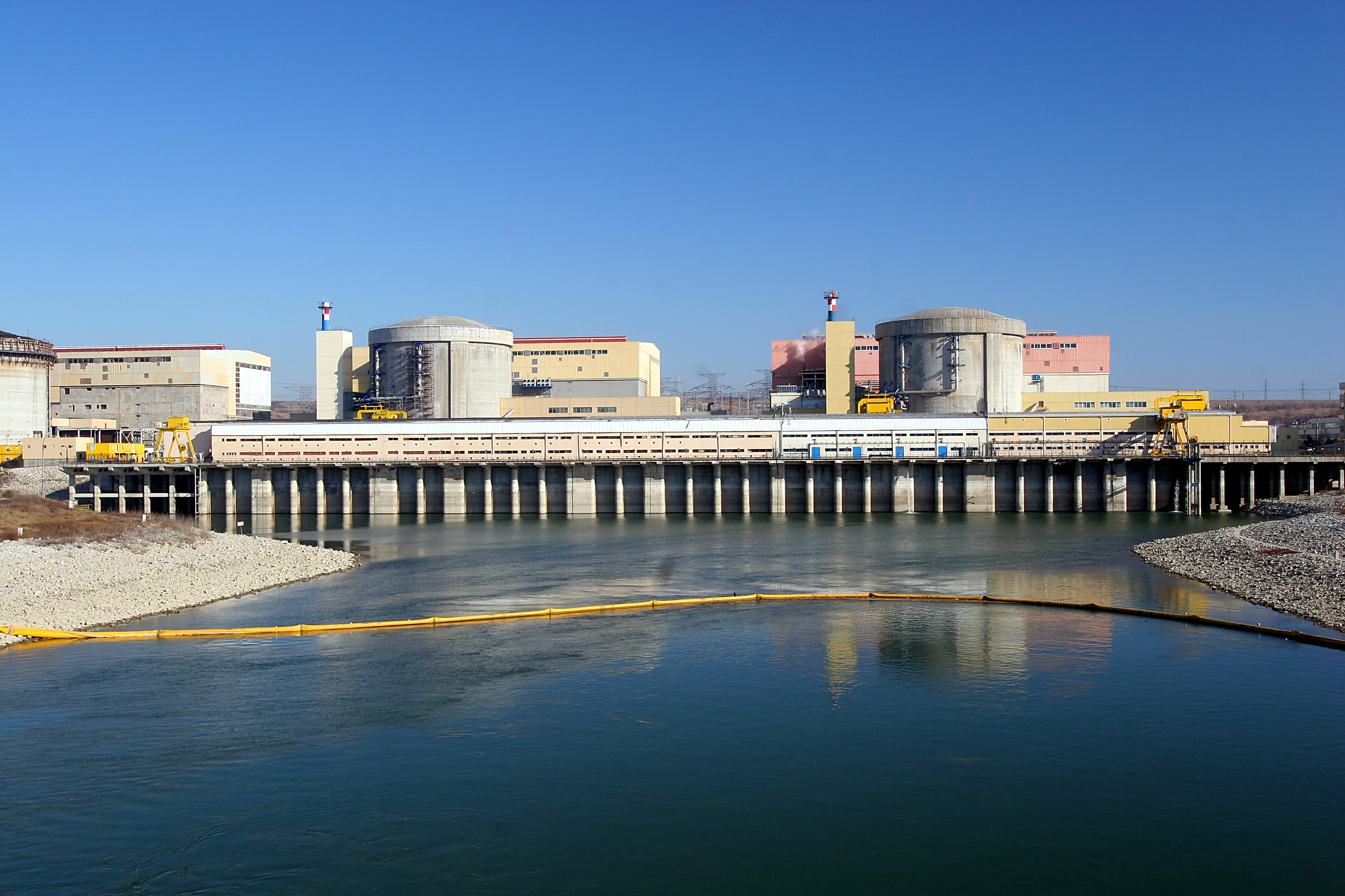 CNE Cernavoda Unitatile 3 si 4